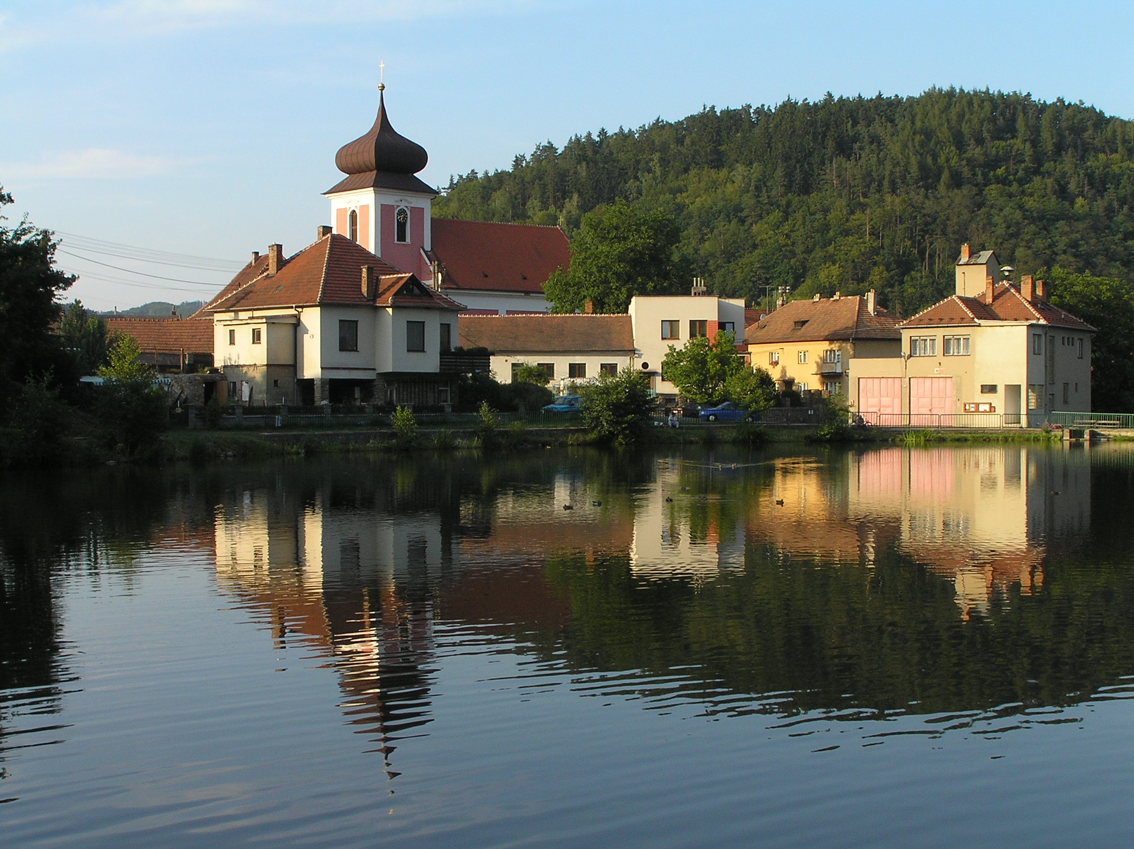 Nedvědice - Czech town in Jihomoravský region, Moravia Czeskie miasto Nedvědice na Morawach (powiat Jihomoravski)